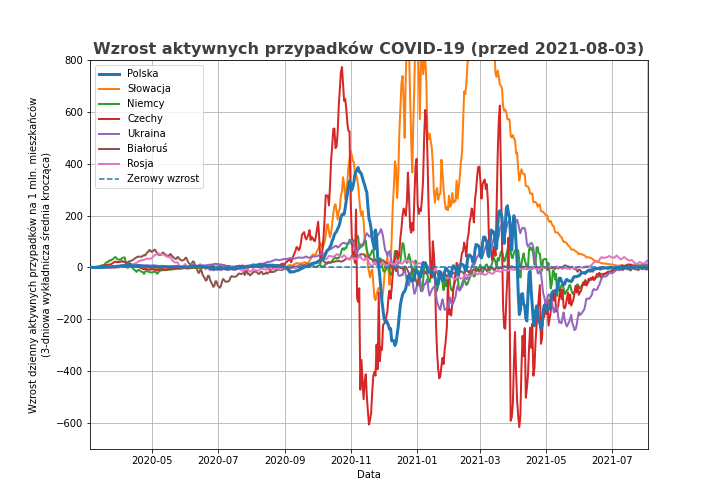 Dzienne zmiany aktywnych przypadków COVID-19 na 1mln mieszkańców w Polsce i krajach sąsiednich. Krzywe są wykładniczą średnią kroczącą (EWA). Wykres na podstawie github datasets, kod źródłowy wykresu w repozytorium covid plots